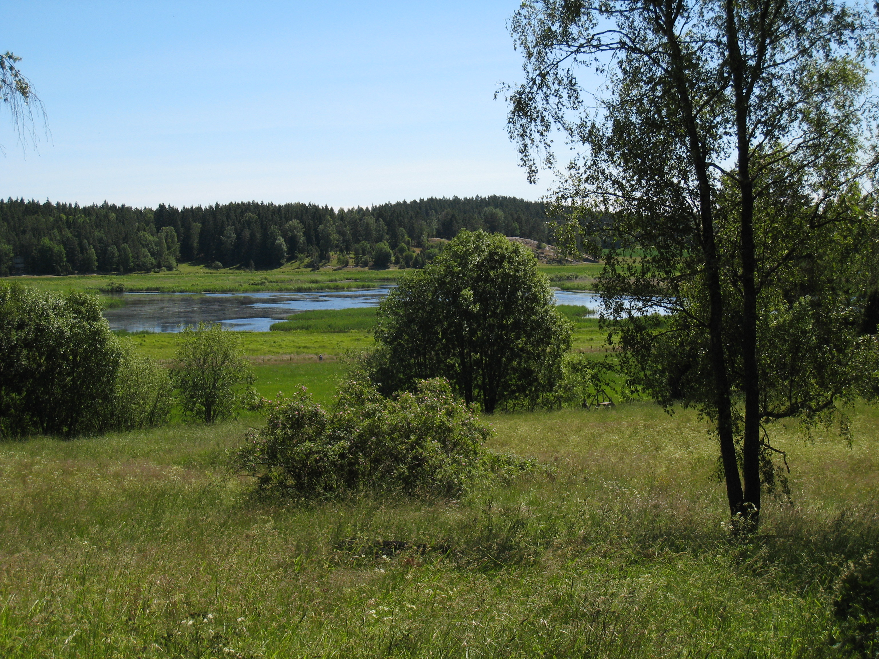 Angarnsjöängen i försommartid. Sjöängen sedd från Kusta gård.